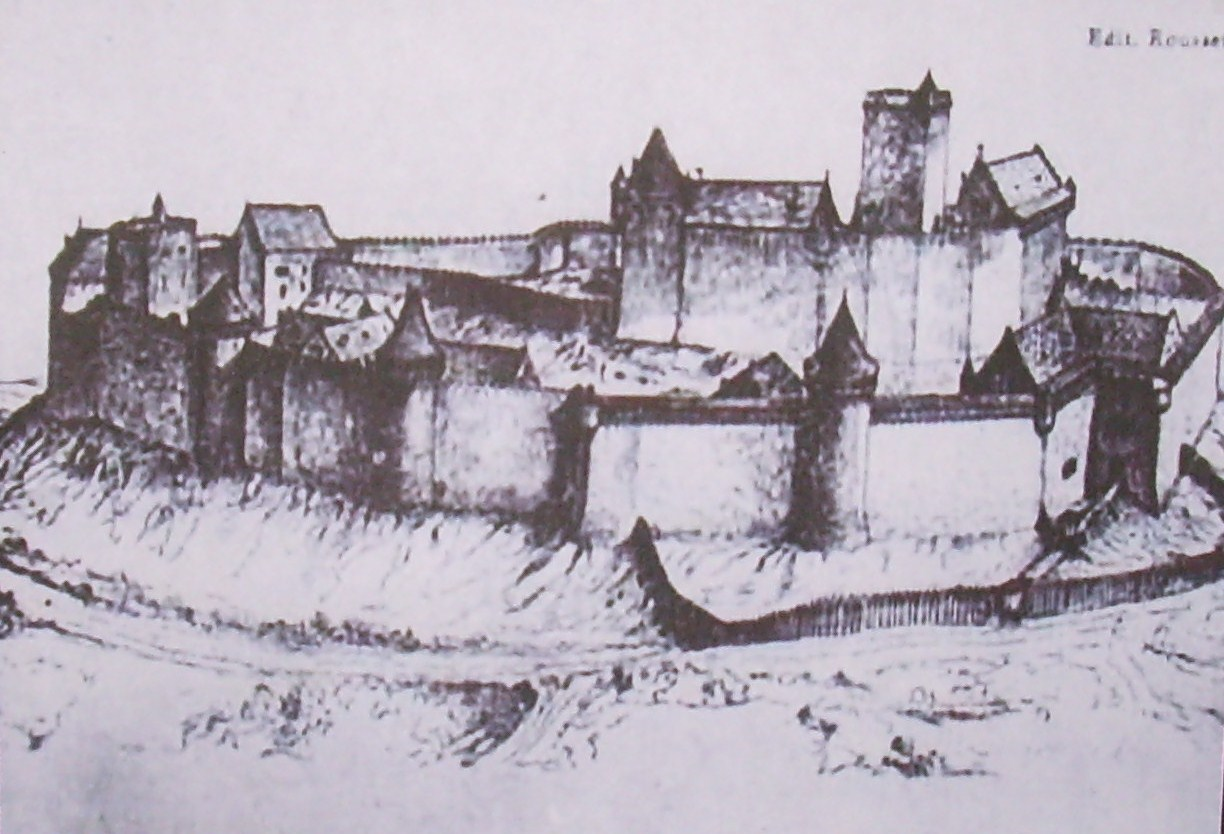 Image du Chateau de Montaigu au Moyen-Age